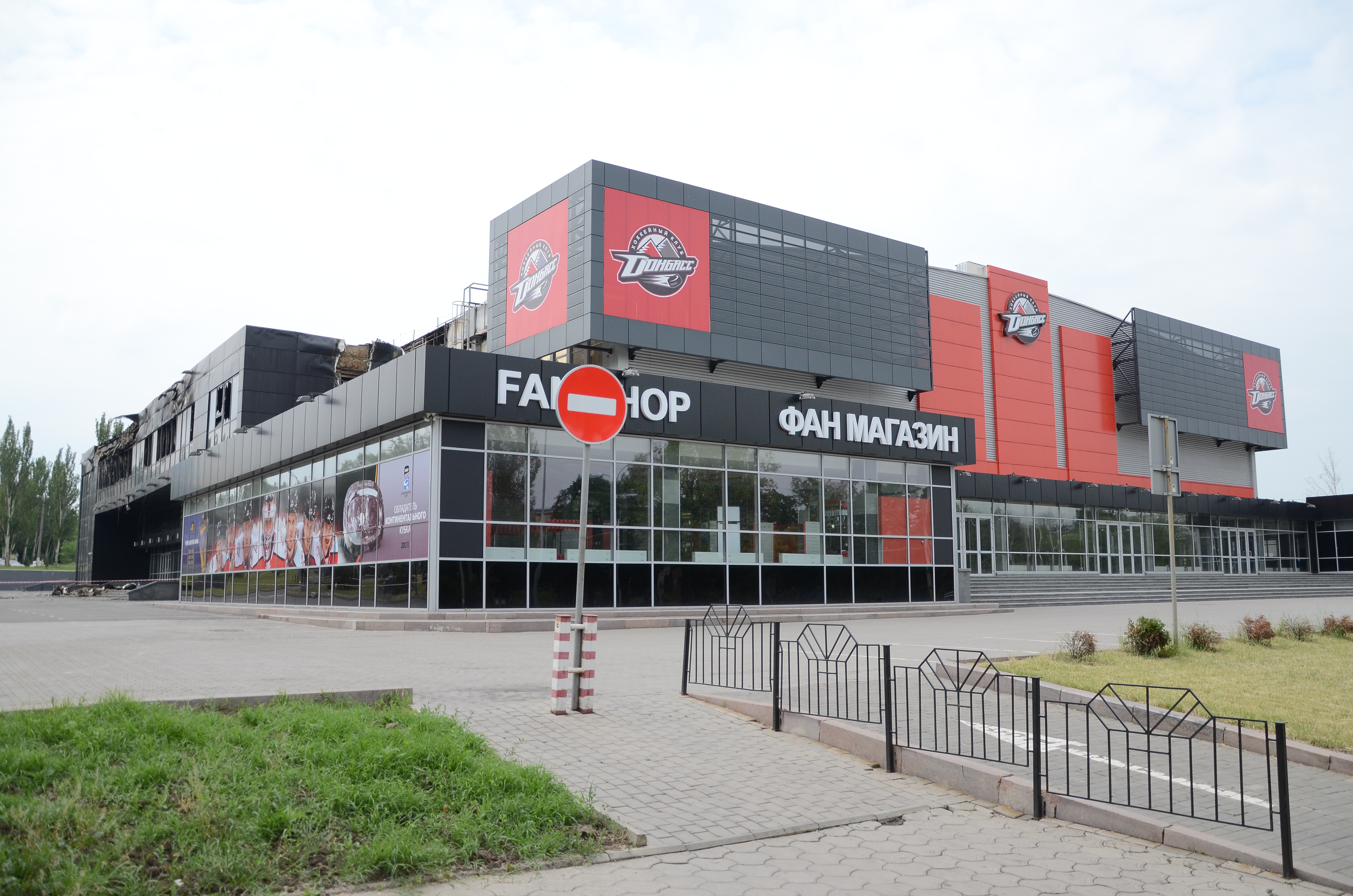 Донецк